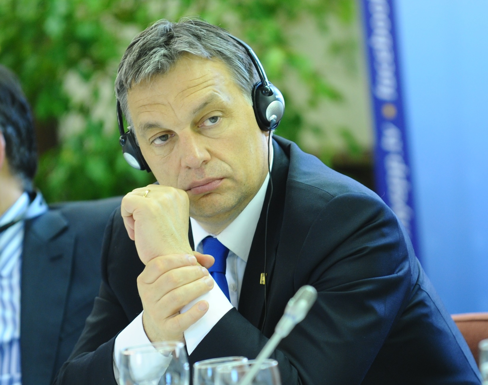 Viktor Orbán